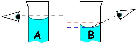 Cómo se debe y como no enrasar.